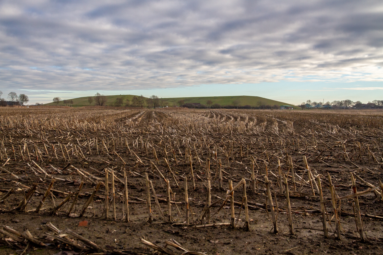 Mülldeponie im Vareler Ortsteil Hohenberge, davor kahles Maisfeld